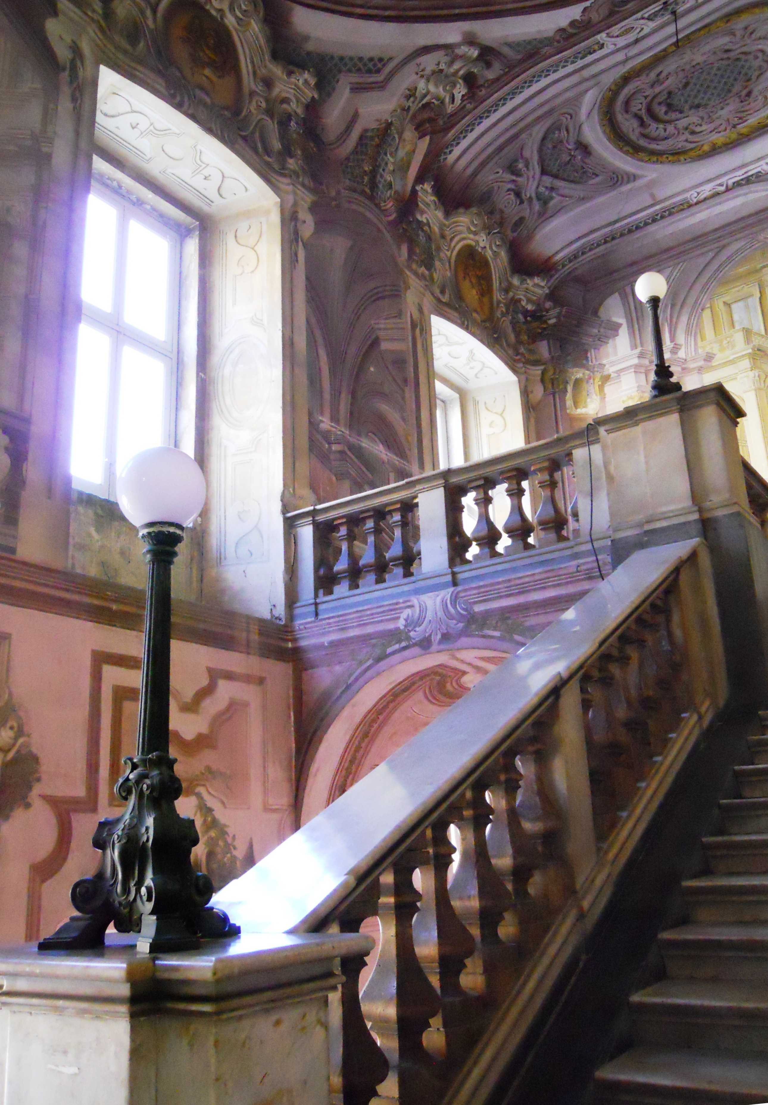 Reggia di Portici - interno